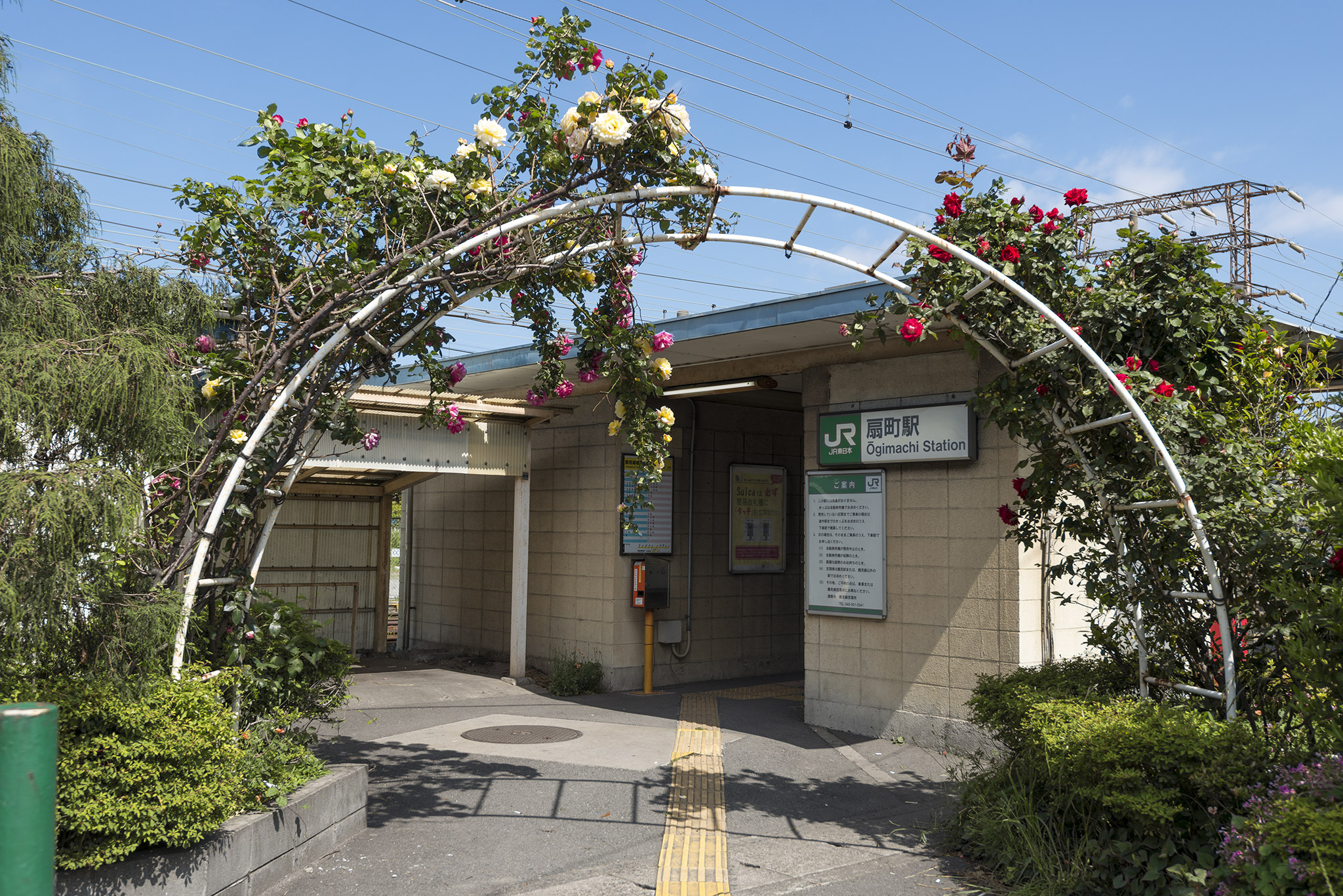 JR東日本鶴見線 扇町駅